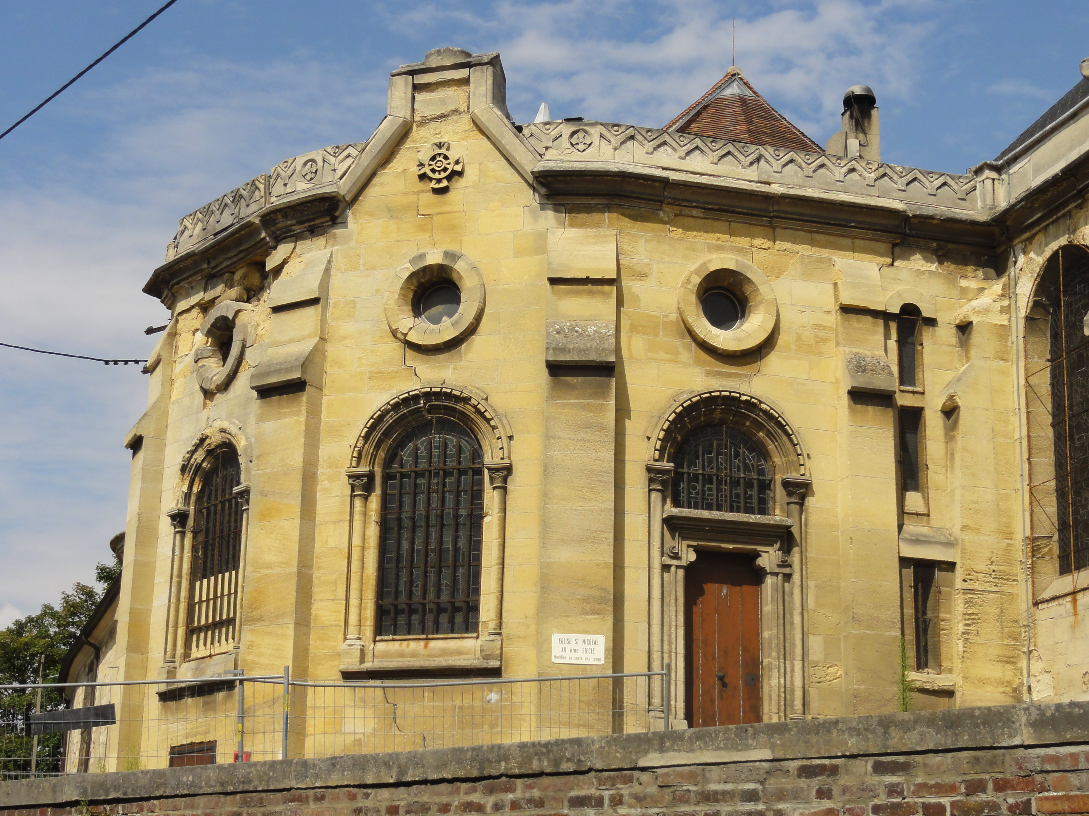 La sacristie de 1878.